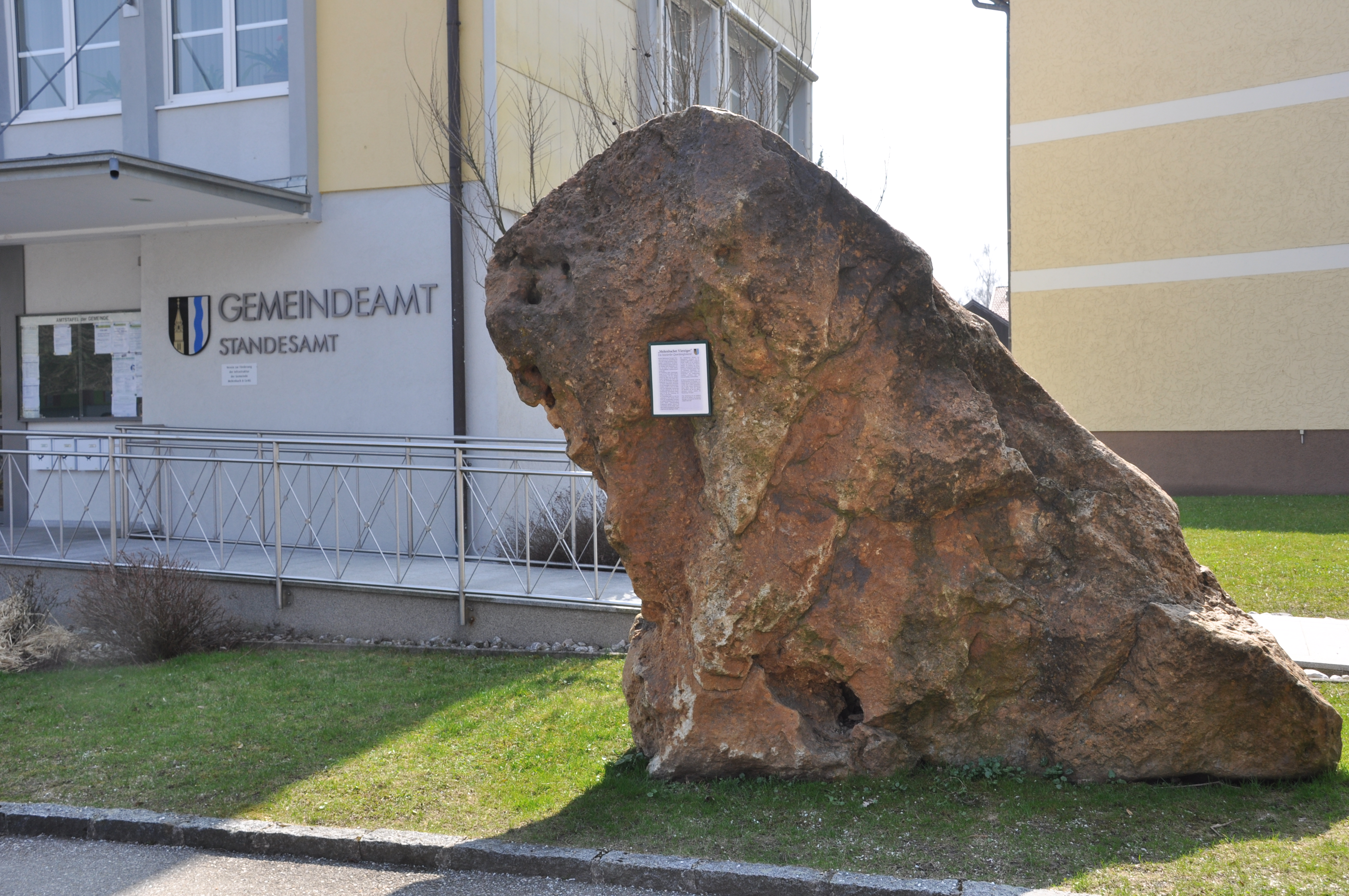 Mehrnbacher "40er", Ein Innviertler Quarzkonglomerat. Im Hintergrund das Gemeindeamt